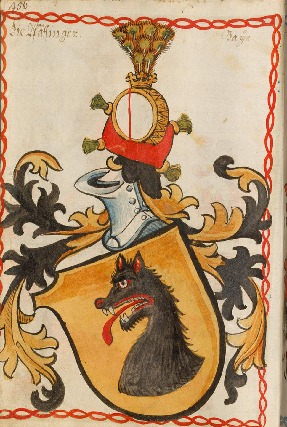 Scheibler'sches Wappenbuch , älterer Teil: Seite 456 die Pfäffinger Bayern